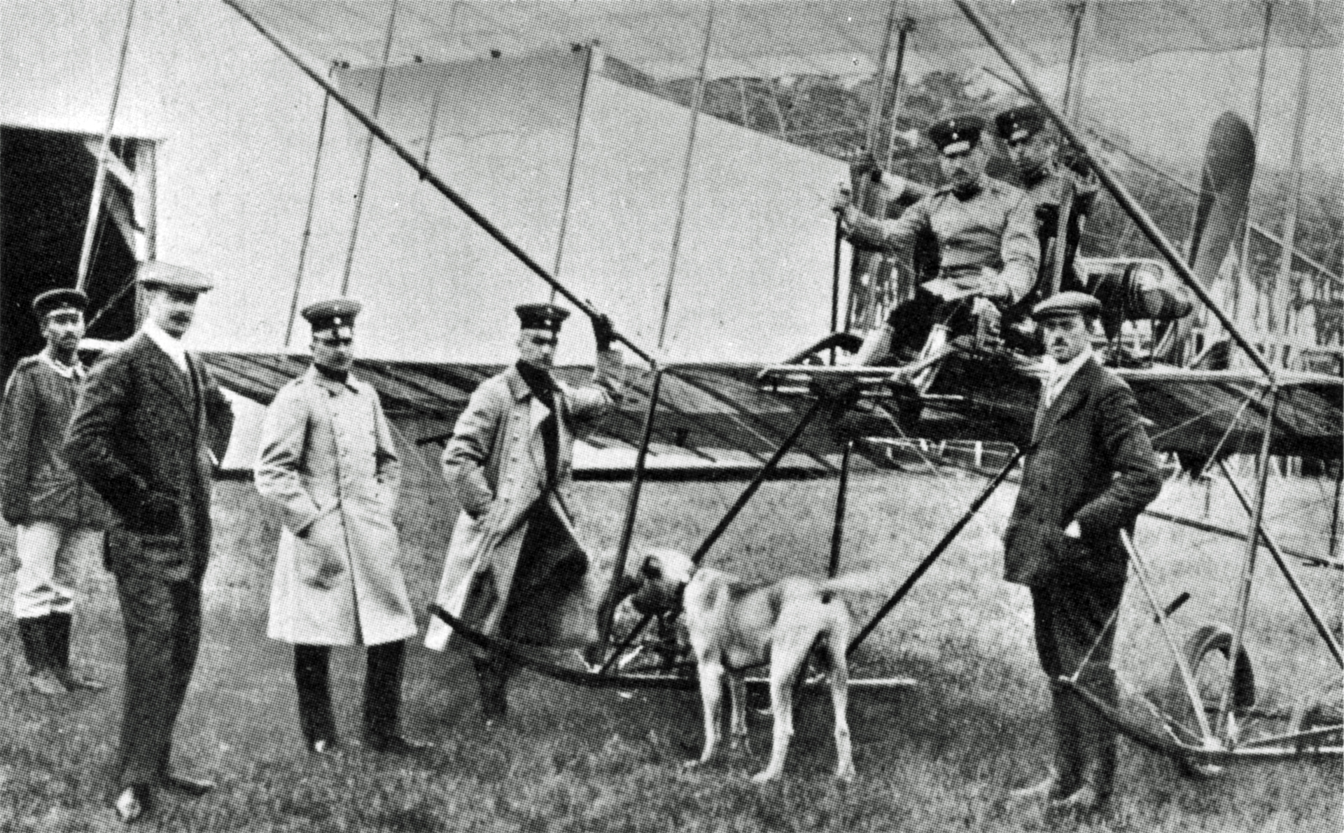 Der Fluglehrer Simon Brunnhuber (rechts) 1910 auf dem Flugplatz Döberitz bei der Ausbildung der ersten deutschen Militärpiloten. Dritter von links: Oberleutnant R. von Tiedemann, rechts daneben Leutnant Mackenthun. Am Steuer des Schulflugzeuges Farman III sitzt Hauptmann De le Roi.